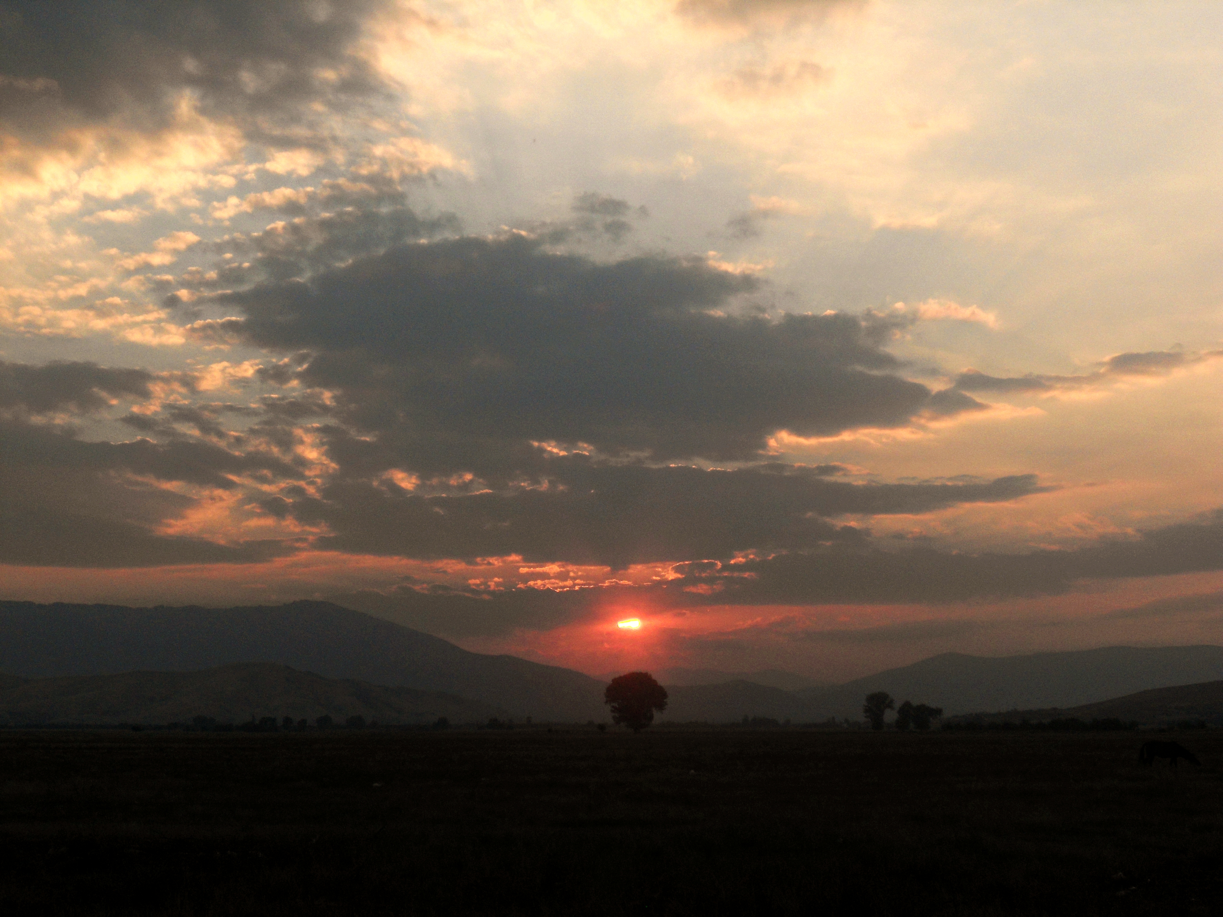 Sunset in Erekovci